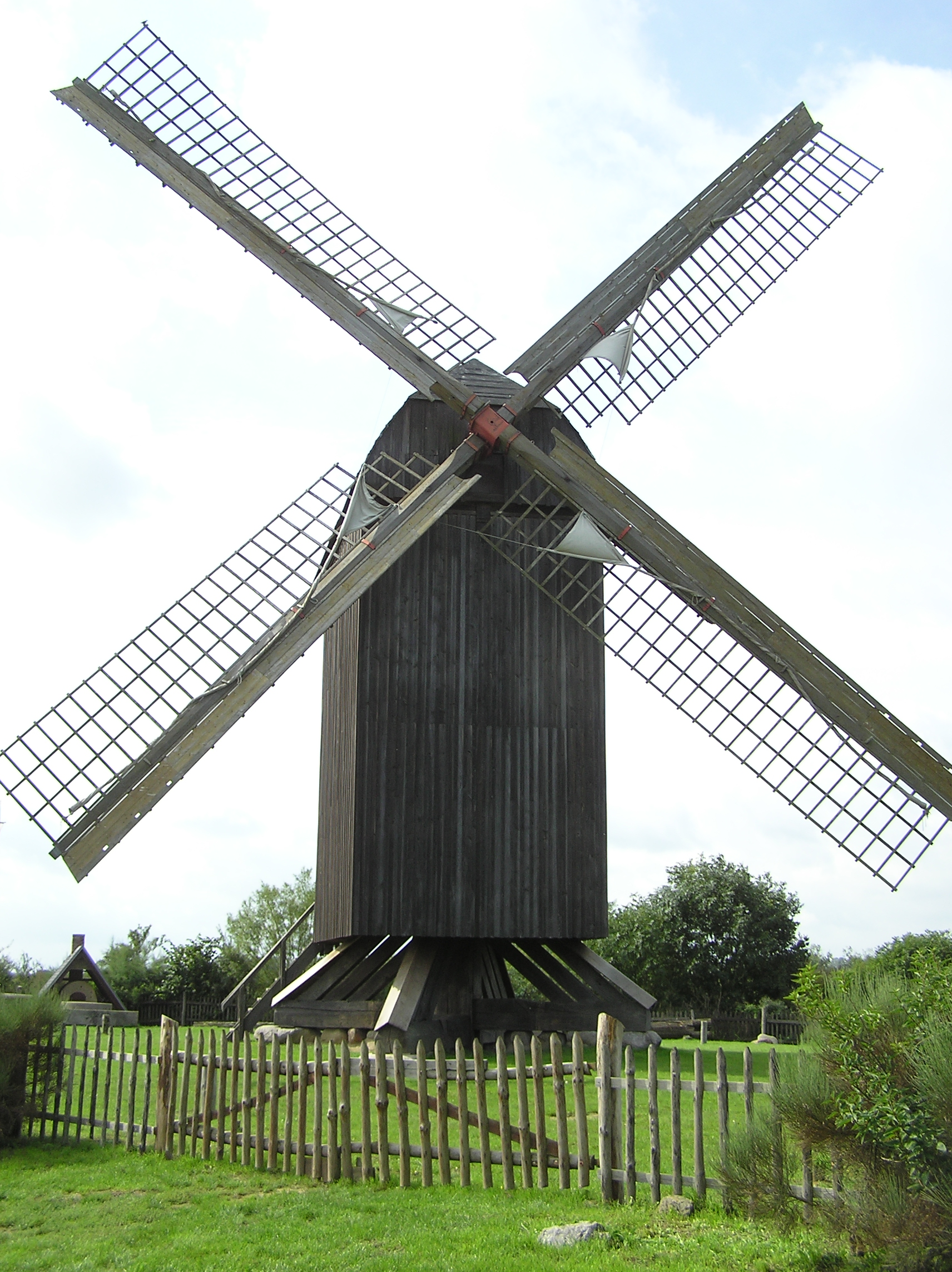 Post mill at Pudagla, Mecklenburg-Vorpommern,Germany